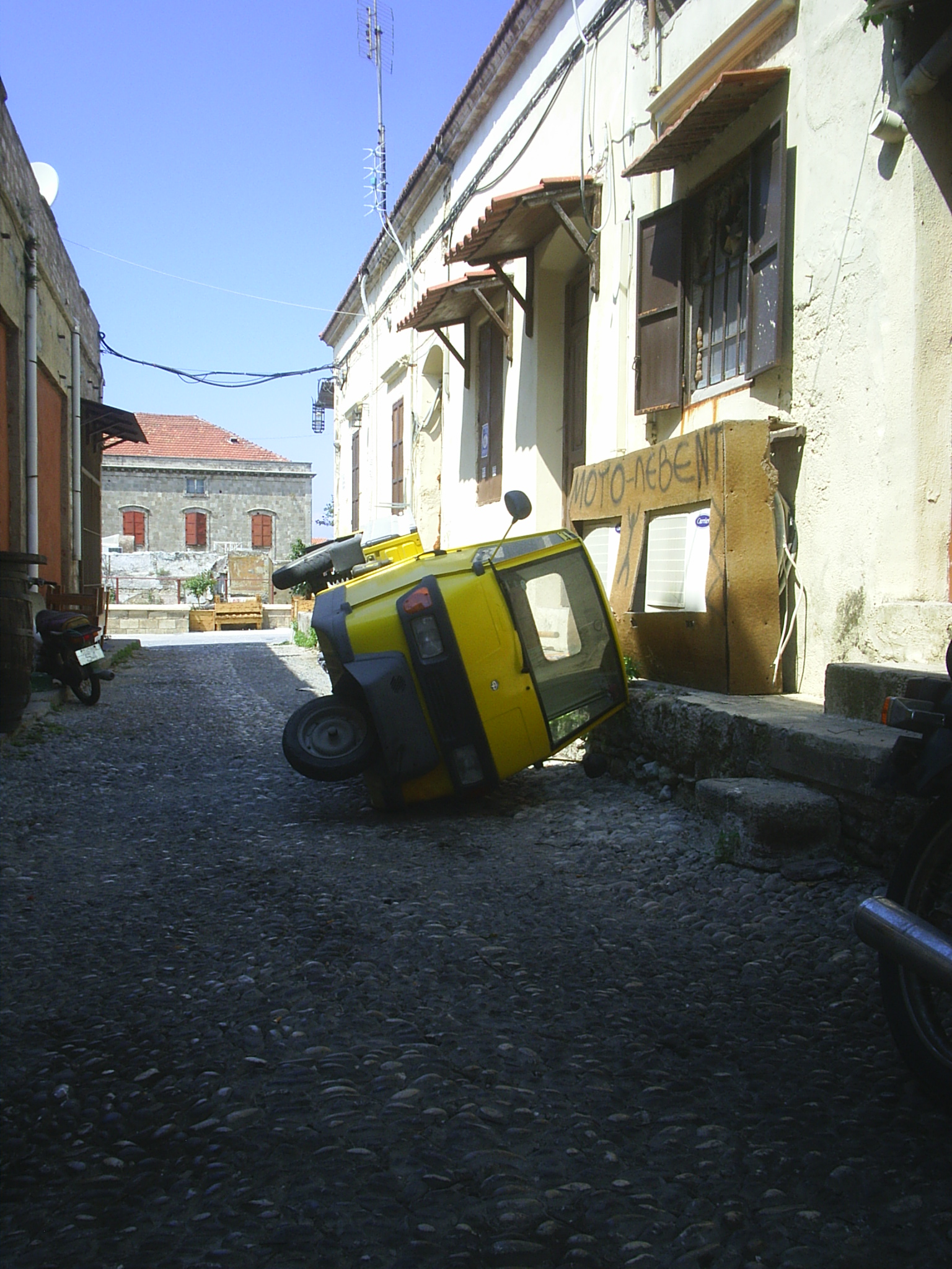 Car on left side